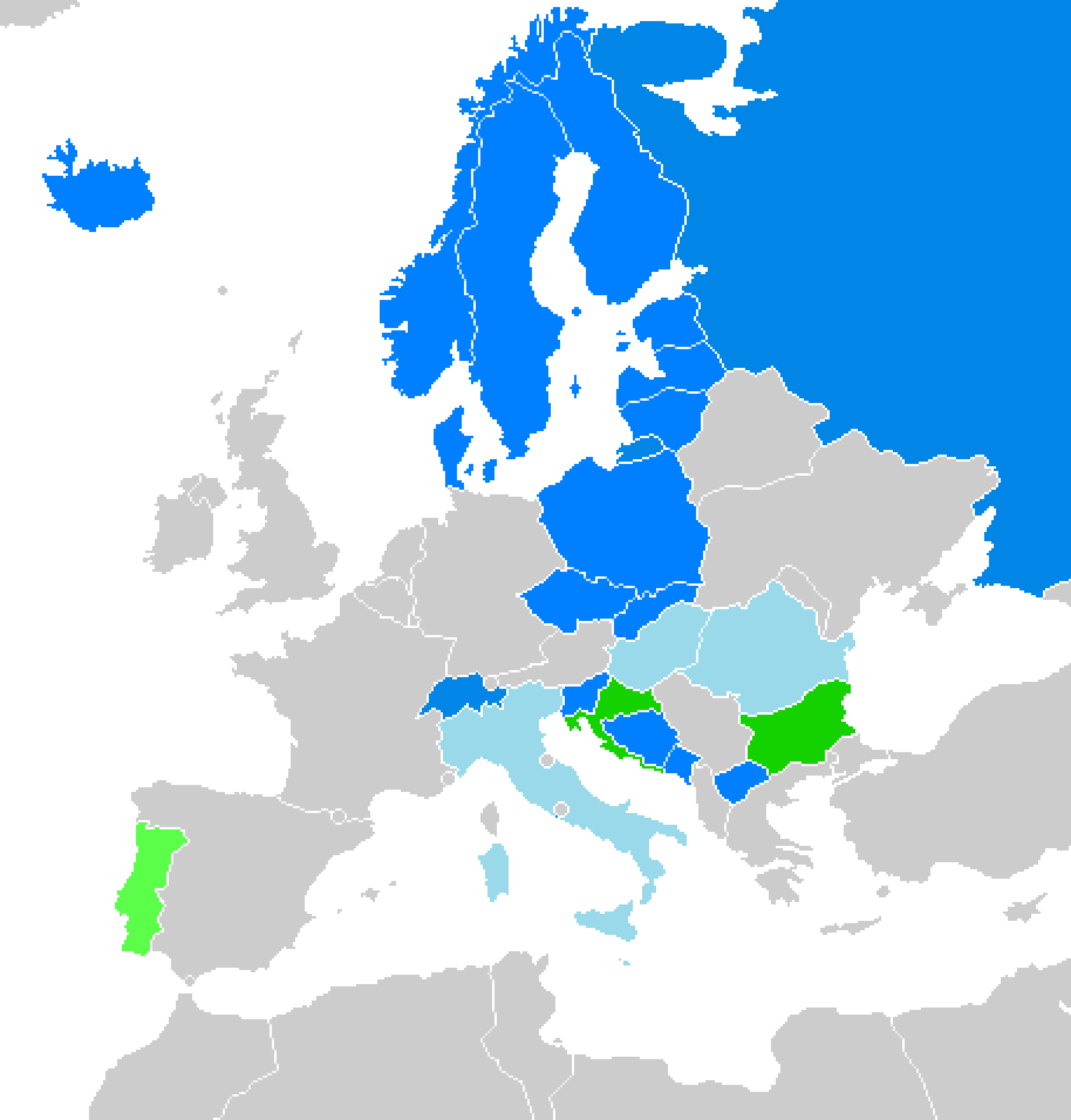 Tagfahrlicht-Vorschriften in Europa blau: auf allen Straßen, ganzjährig hellblau: außerorts, ganzjährig grün: auf allen Straßen im Winterhalbjahr hellgrün: streckenweise, ganzjährig